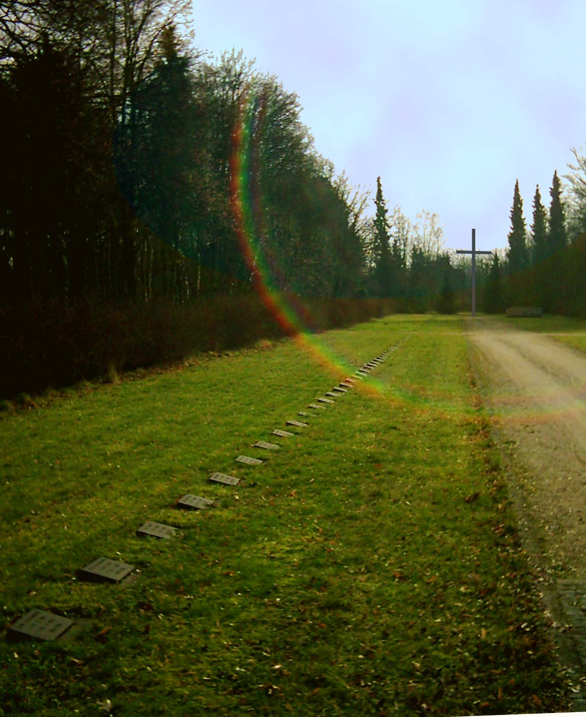 Ehrenhain für Kriegsopfer des Ersten Weltkrieges (Friedhof Pankow XII - Buch)